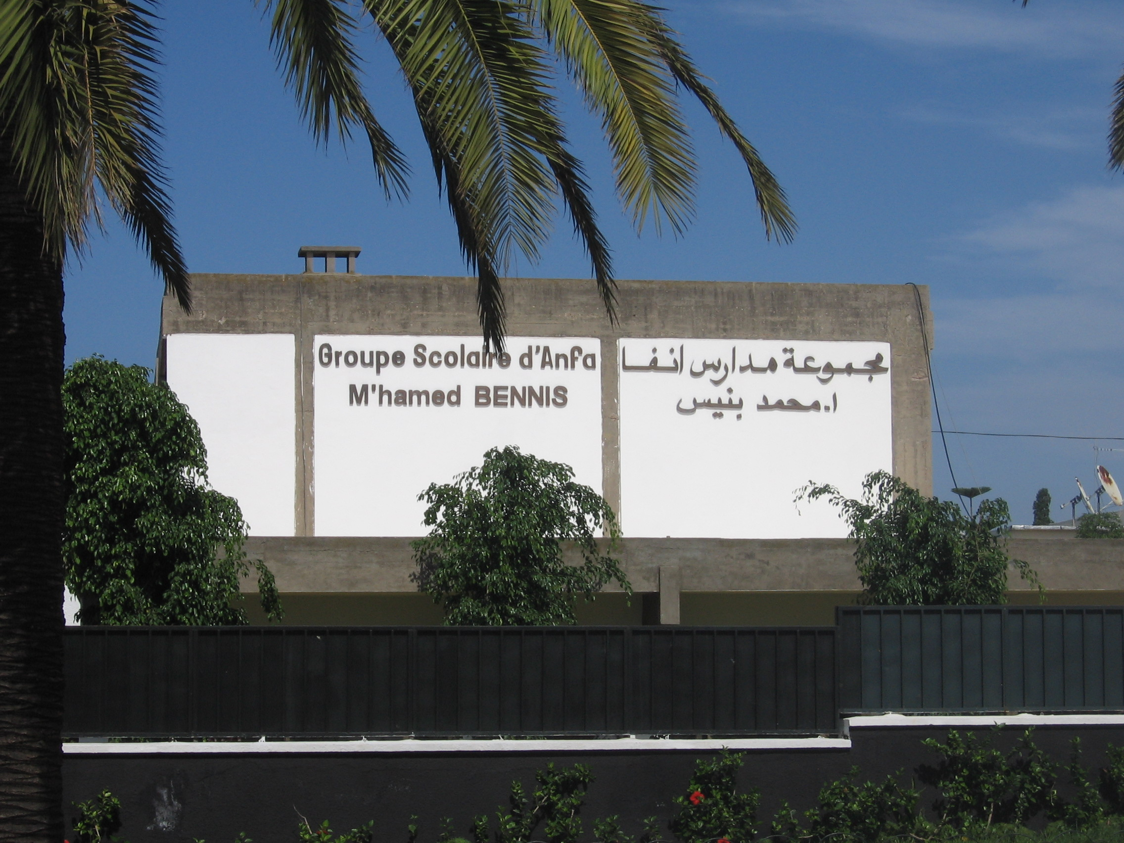 L'école groupe scolaire d'anfa à Casablanca.